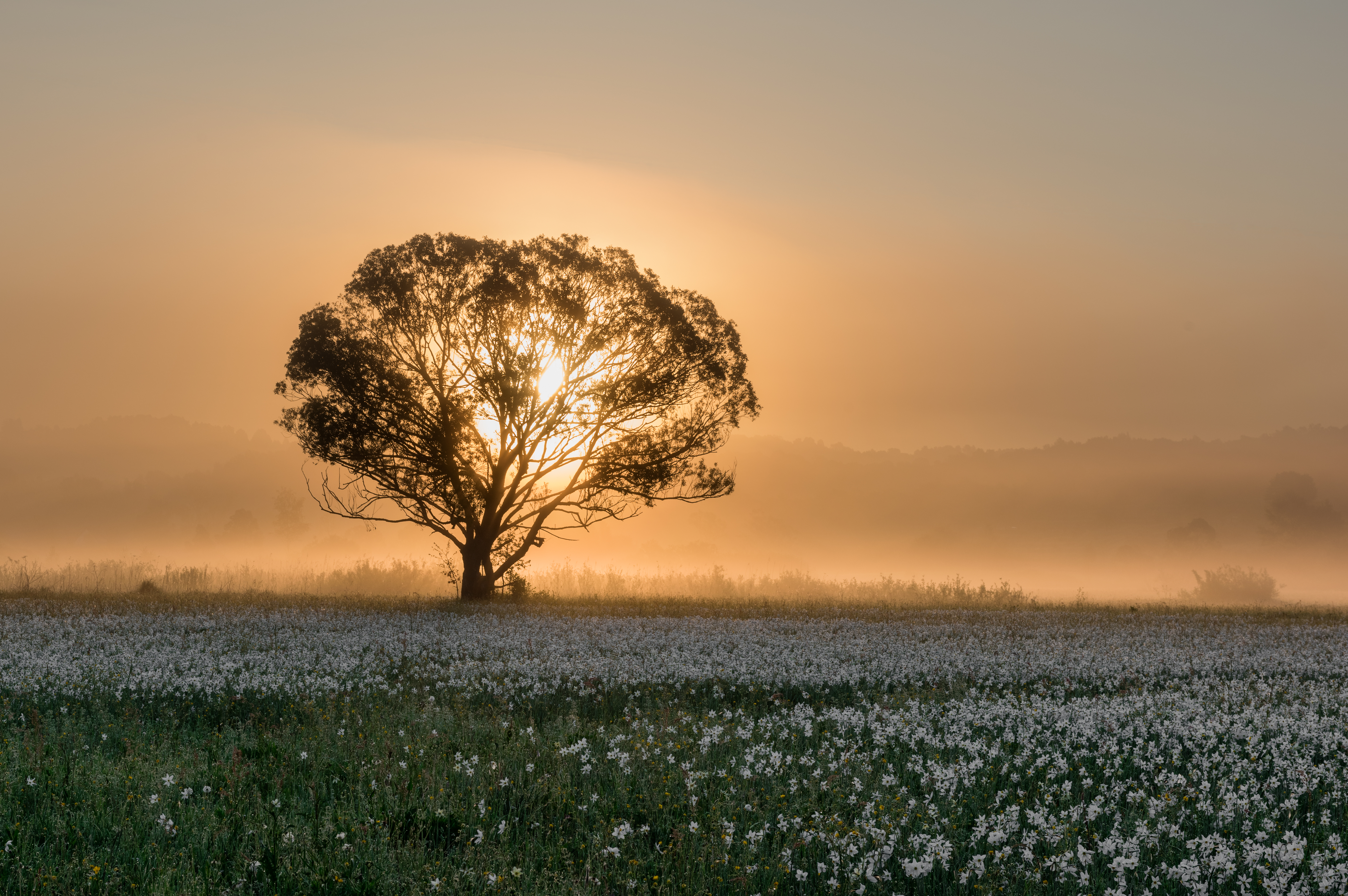 Схід сонця у Долині нарцисів. Травень, майже пік цвітіння